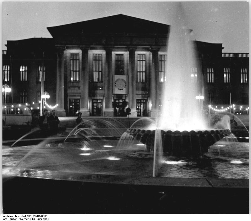 Chemnitz, Kulturpalast, Nacht Zentralbild Krisch 14.6.1960 Blick auf den Kulturpalast der Werktätigen der SDAG Wismut in Karl-Marx-Stadt.